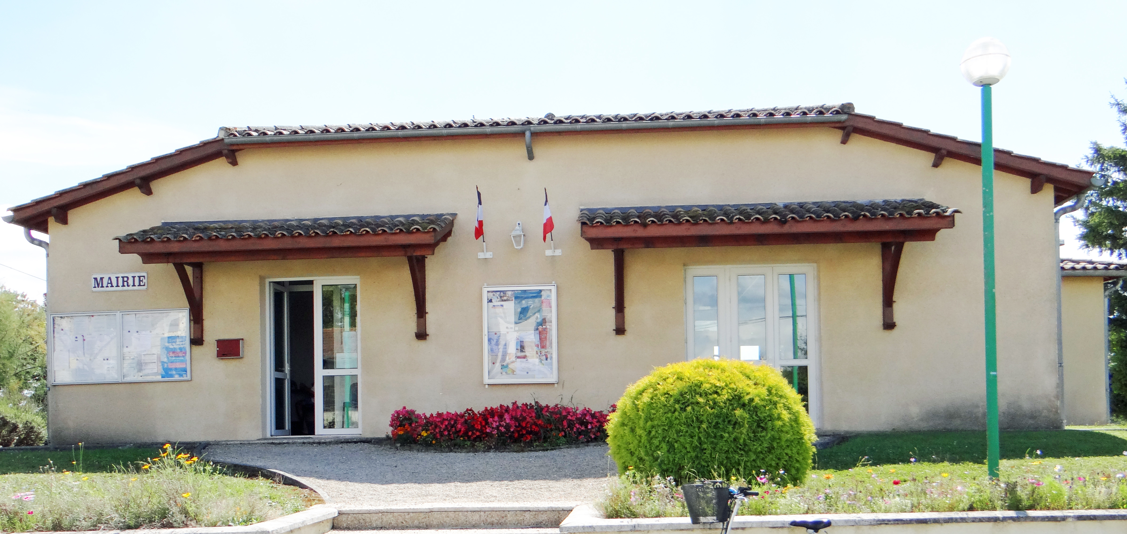 Doudrac - Mairie